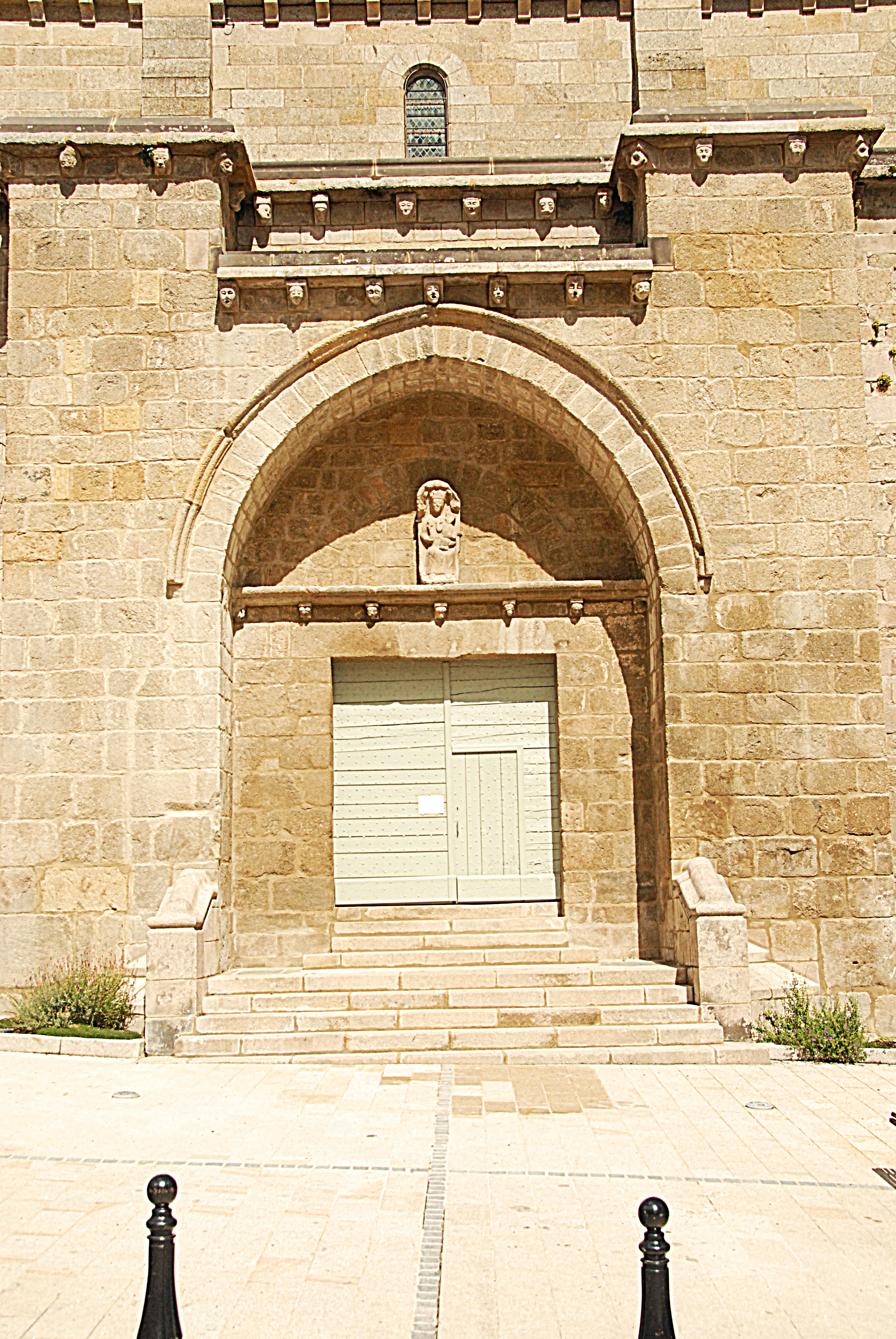 N.-D. de La Souterraine, Südportal von S